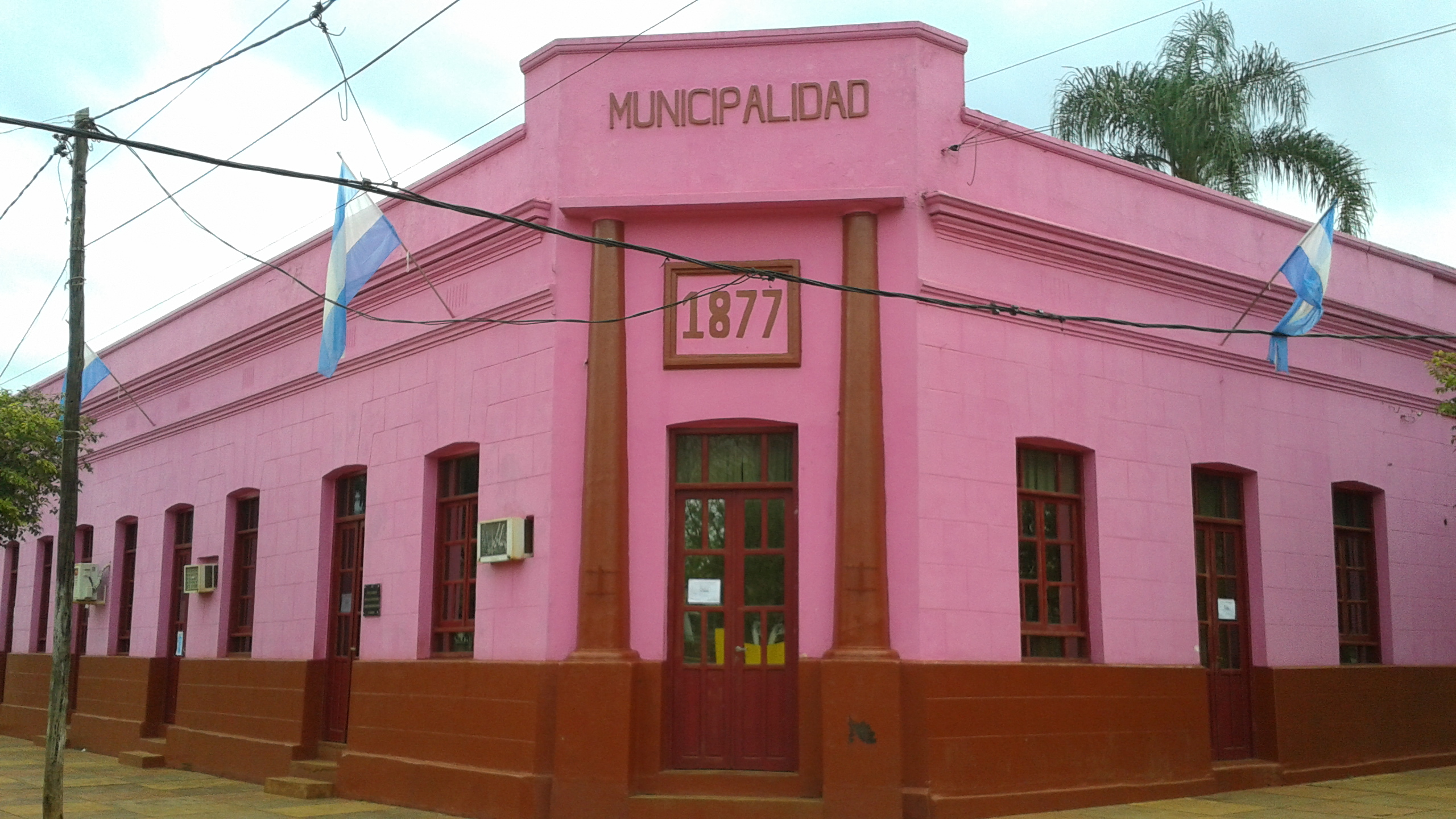 Municipalidad de Santa Ana (Provincia de Misiones, Argentina).